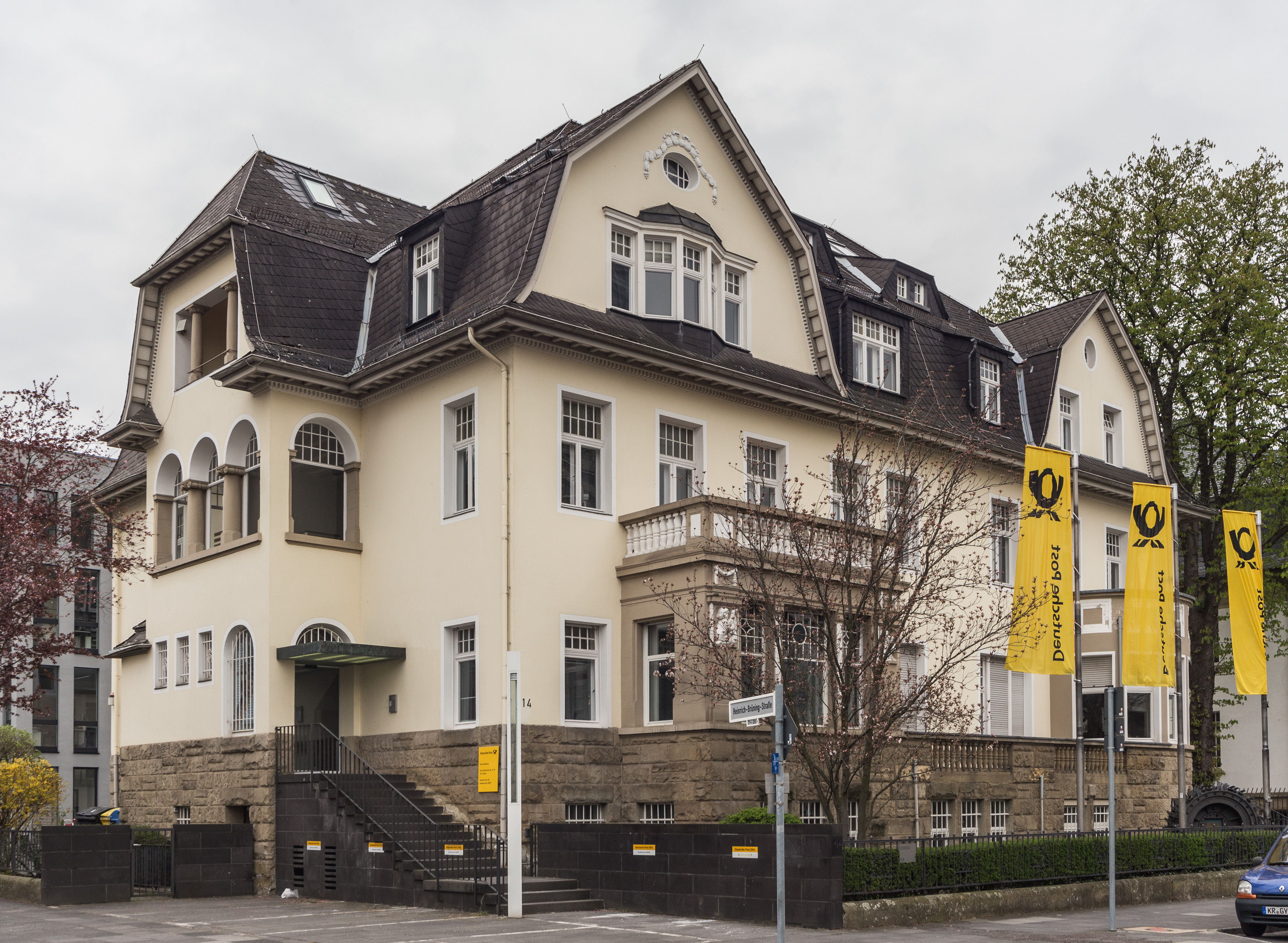 Doppelvilla (ehem. Landesvertretung Saarland), Kurt-Schumacher-Straße 14 (li.)-12 (re.), Bonn